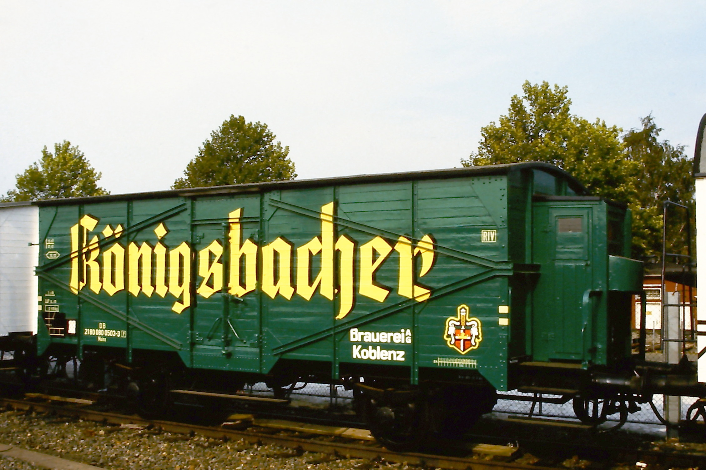 Kühlwaggon der Königsbacher Brauerei, ausgestellt auf der Fahrzeugschau 150 Jahre deutsche Eisenbahn in Bochum-Dahlhausen